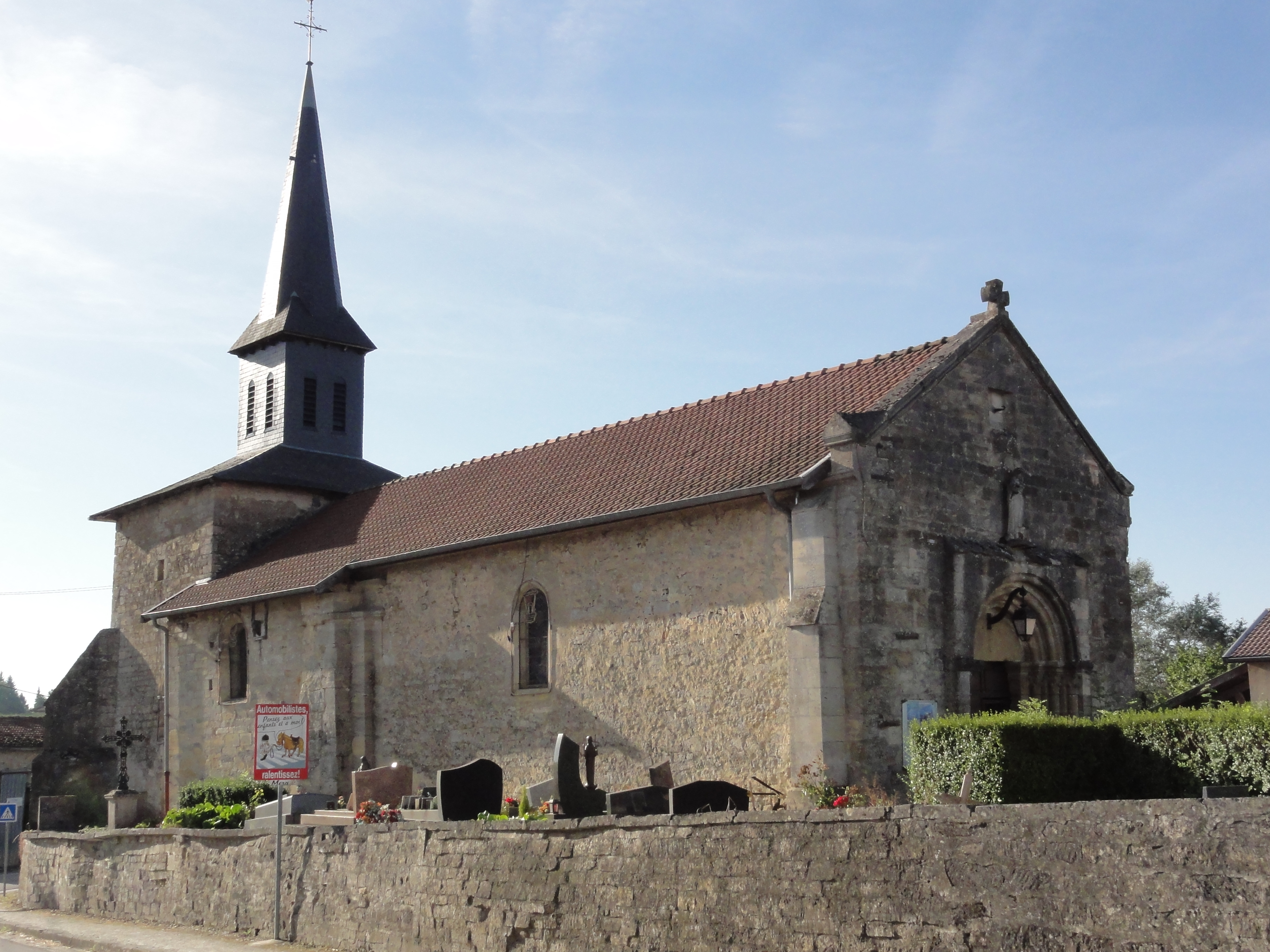 Baudonvilliers (Meuse) église